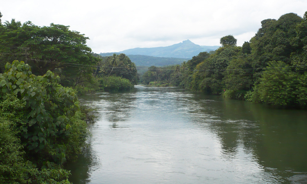 ഈരാറ്റുപേട്ട വടക്കേക്കരയിൽ മീനച്ചിലാറിന്റെ ദൃശ്യം. പശ്ചാത്തലത്തിൽ വായ തുറന്ന മനുഷ്യന്റെ രൂപം പോലെ കാണുന്ന മലയാണ് ഇല്ലിക്കൽ കല്ല്.